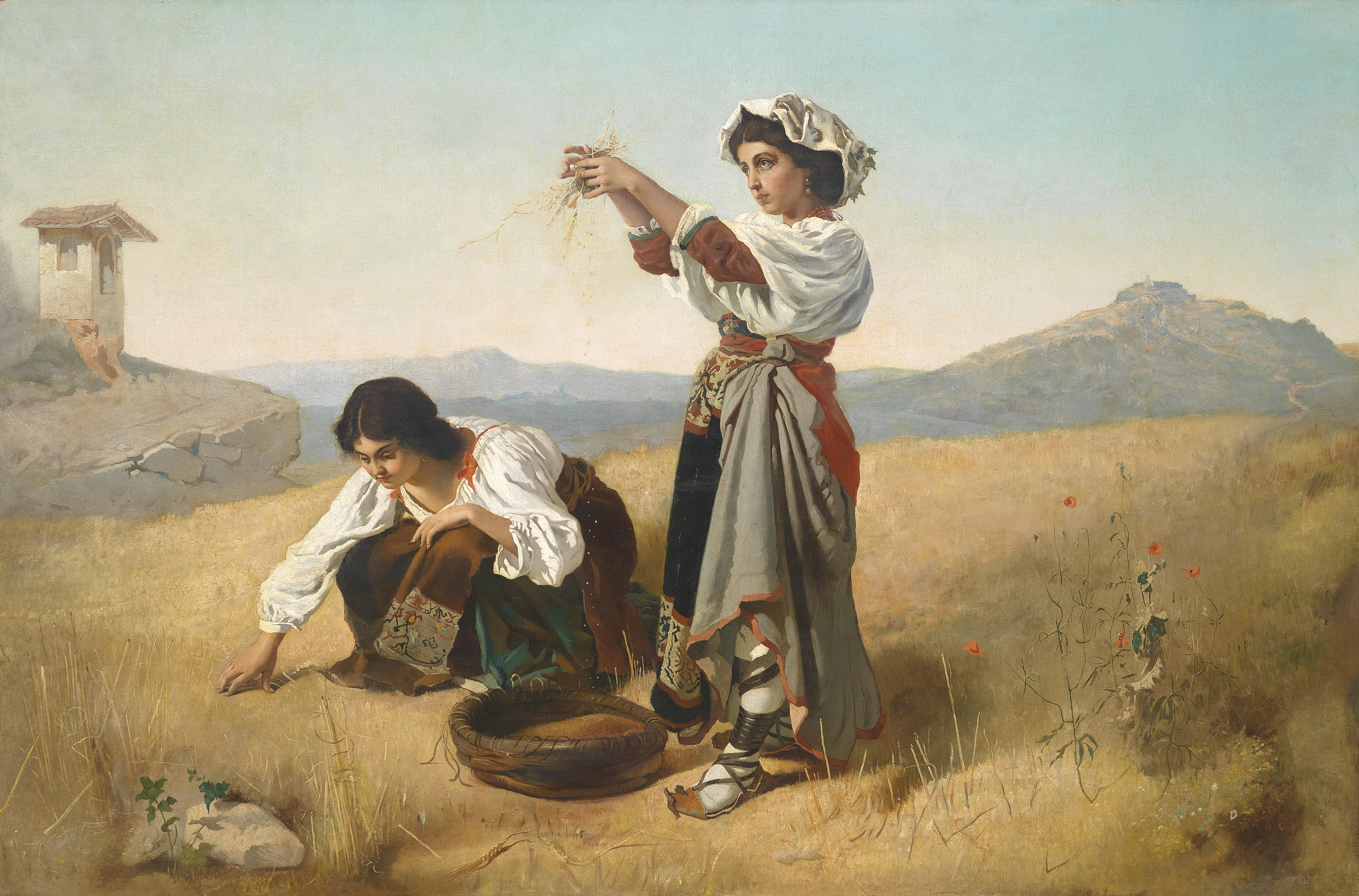 Nach der Erntetitle QS:P1476,de:"Nach der Ernte" label QS:Lde,"Nach der Ernte"